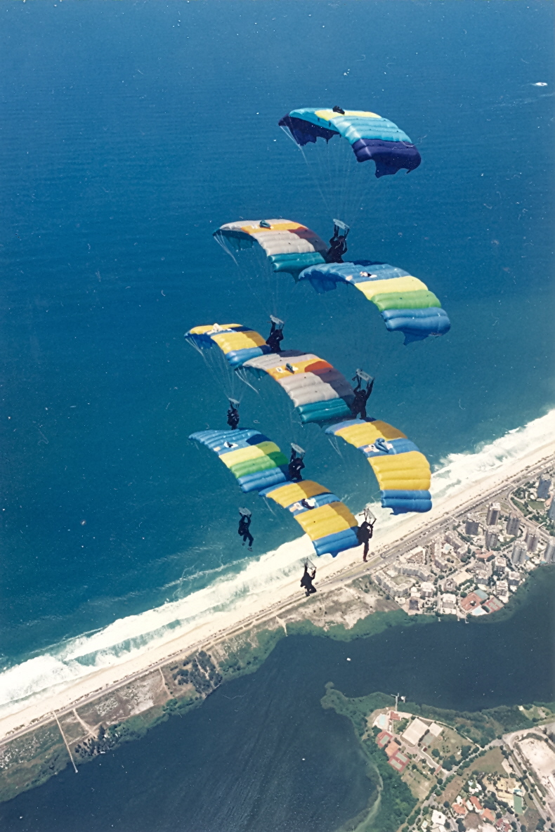 TRV Rio de Janeiro